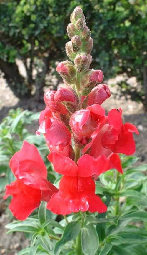 Antirrhinum majus 'Sonnet Carmine', cultivar de muflier, esplanade Milne-Edwards, Jardin des Plantes de Paris.